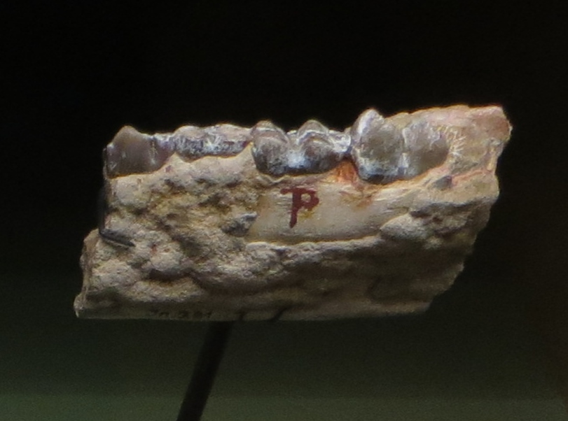 Fossil of Propotamochoerus - Took the picture at Natural History Museum, Basel